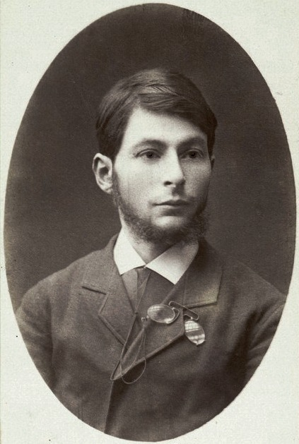 שני תצלומי דיוקן זהים של המצי"ר - מרדכי צבי מאנה: הדפסים בתבנית Carte de visite, גוני חום, 6.5X10.5 ס"מ. שני תצלומי דיוקן אלה הופקו בעיר ממל, והם כנראה רפרודוקציות מתצלום דיוקן מוקדם יותר, שהופק בעיר ורשה, בשנות השמונים של המאה התשע עשרה. אחד מן התצלומים נתון בתוך מעטפת צלופן מקורית, מן המאה התשע עשרה.